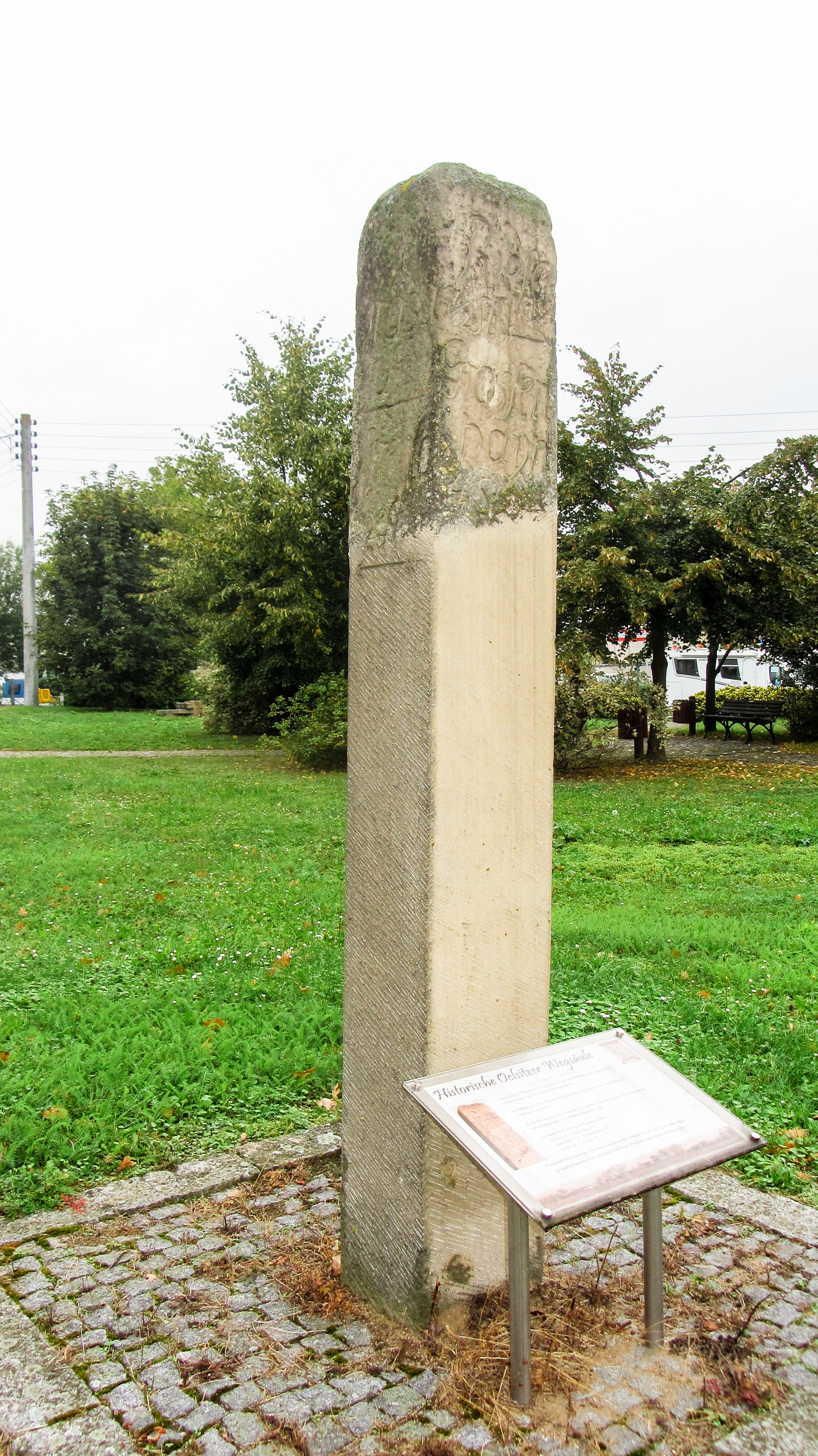 Wegestein, vor Riesaer Straße 28 in Riesa Stt. OelsitzText: Riesa 1/2 St. ; Großenhain 4 St. ; Lommatzsch 2 St. ; Lommatzsch 2 1/4 St. ; Gröba 1 St. ; Strehla 2 St. ; Richtungsweiser